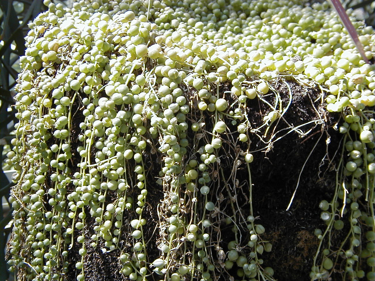 Senecio rowleyanus. Real Jardín Botánico, Madrid, España.